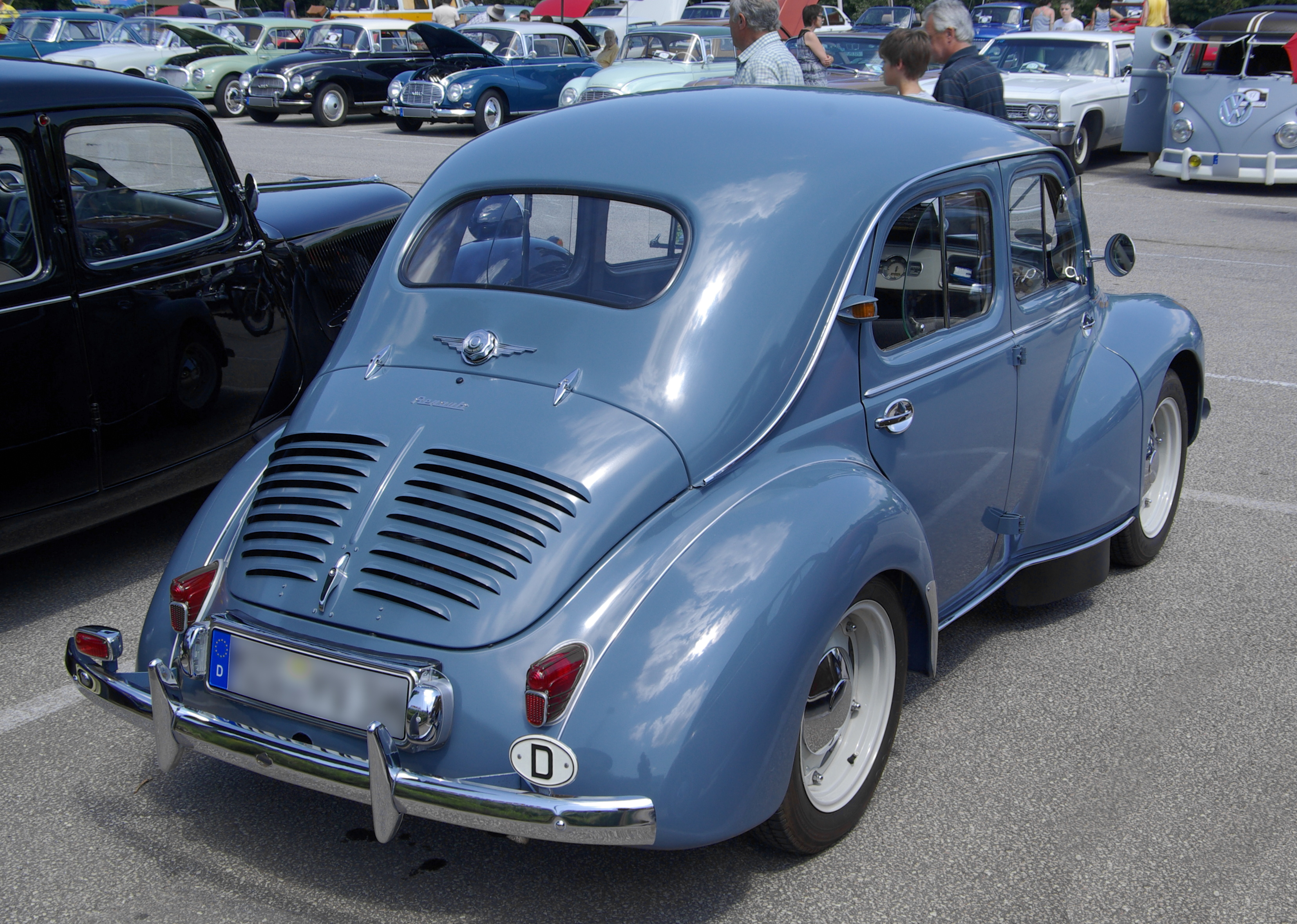 Renault 4CV, Baujahr 1955, Leistung 21 PS, 29. Internationales Oldtimer-Treffen, Konz